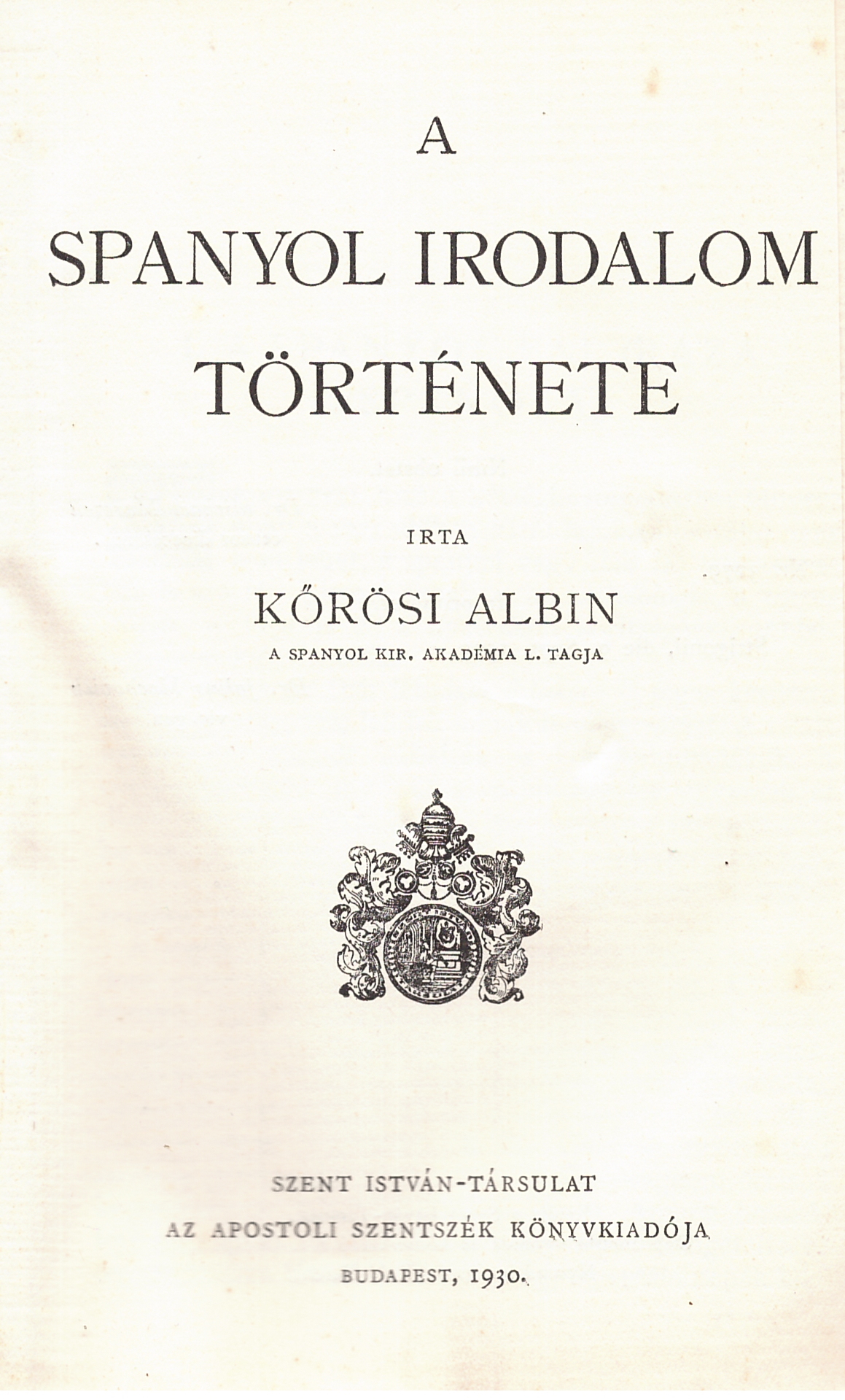 Kőrösi Albin (1860-1936): A spanyol irodalom története (1930)